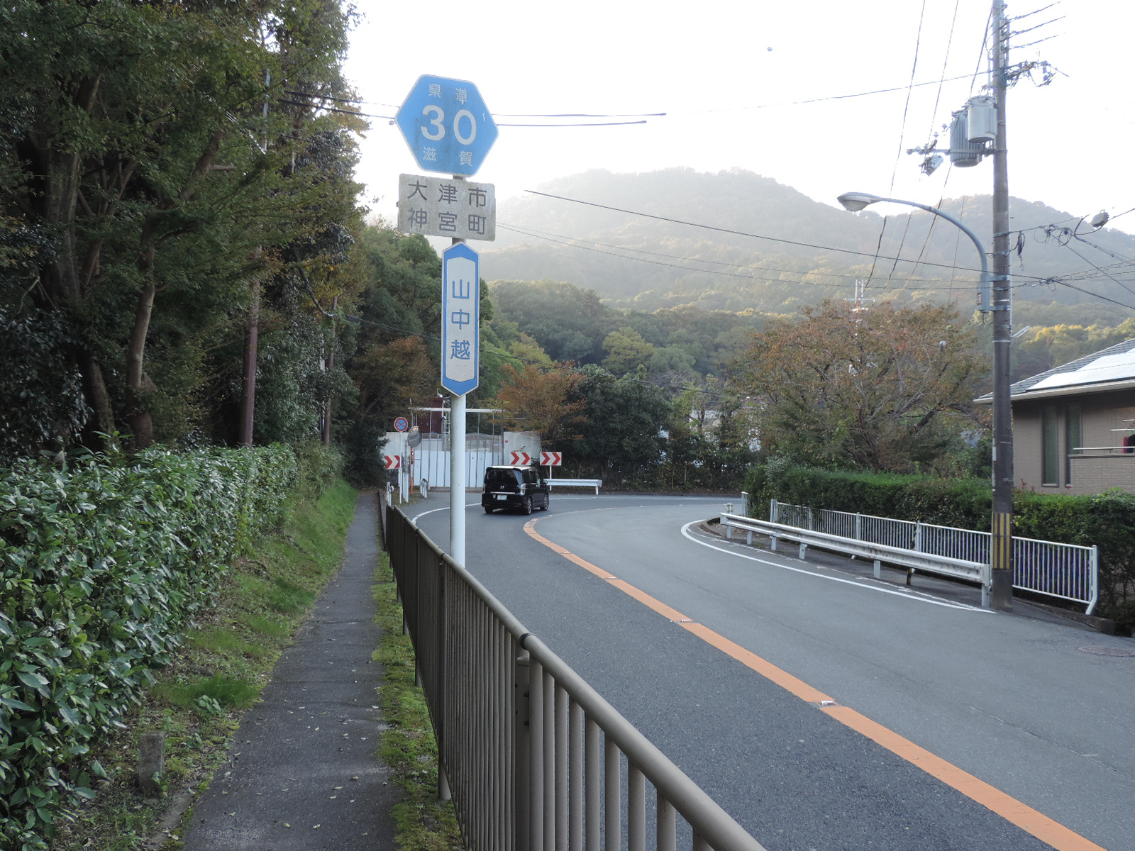 滋賀県道30号下鴨大津線。大津市神宮町にて。2017年撮影